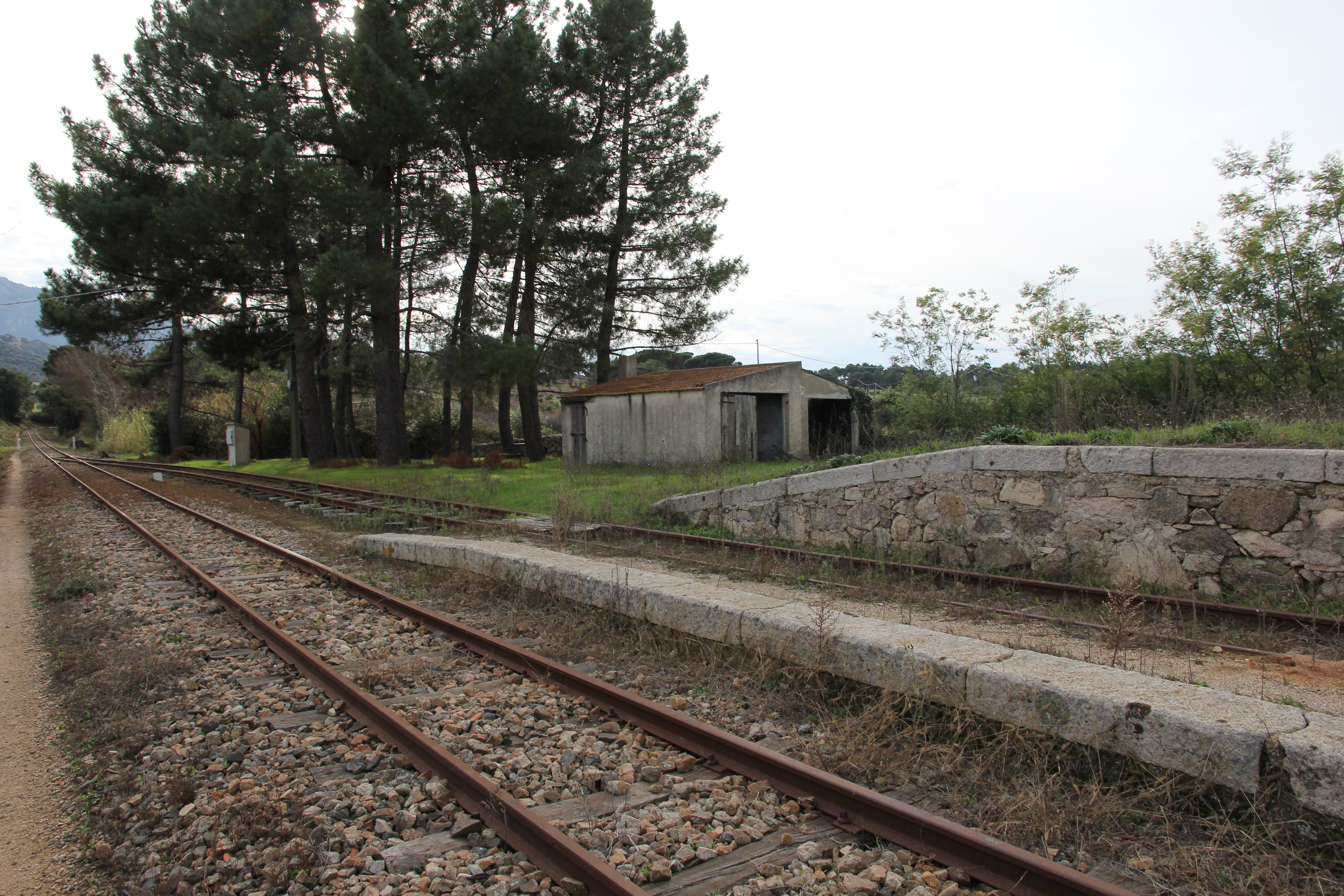 Stazione ferroviaria di Nuchis